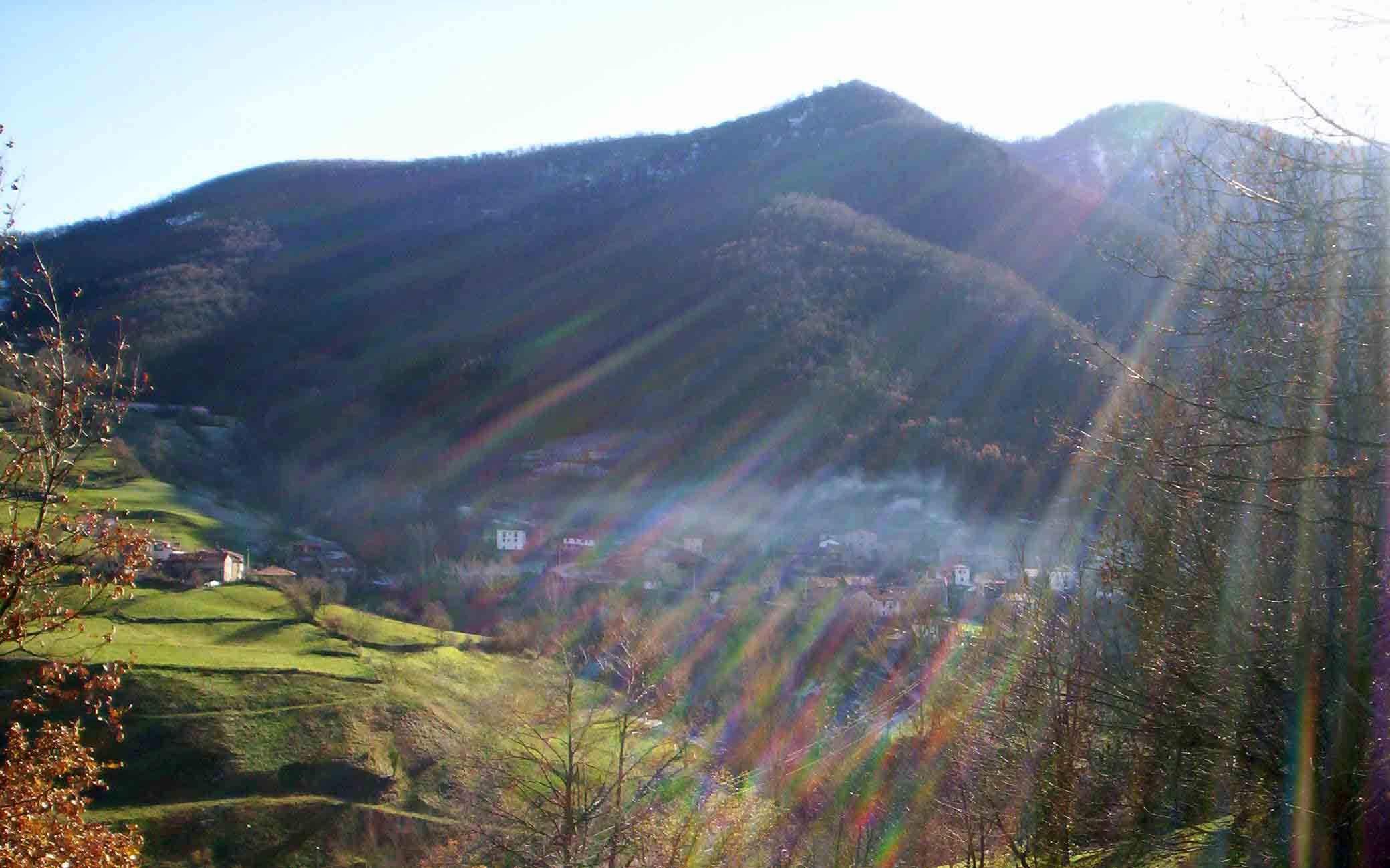 Cosgaya, diciembre de 2006